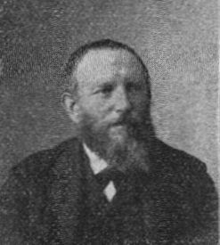 Der Vorarlberger Landtags- und Reichsratsabgeordnete Martin Thurnher